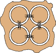 À la différence de la cotte de mailles, les anneaux de la broigne sont cousus sur un support.